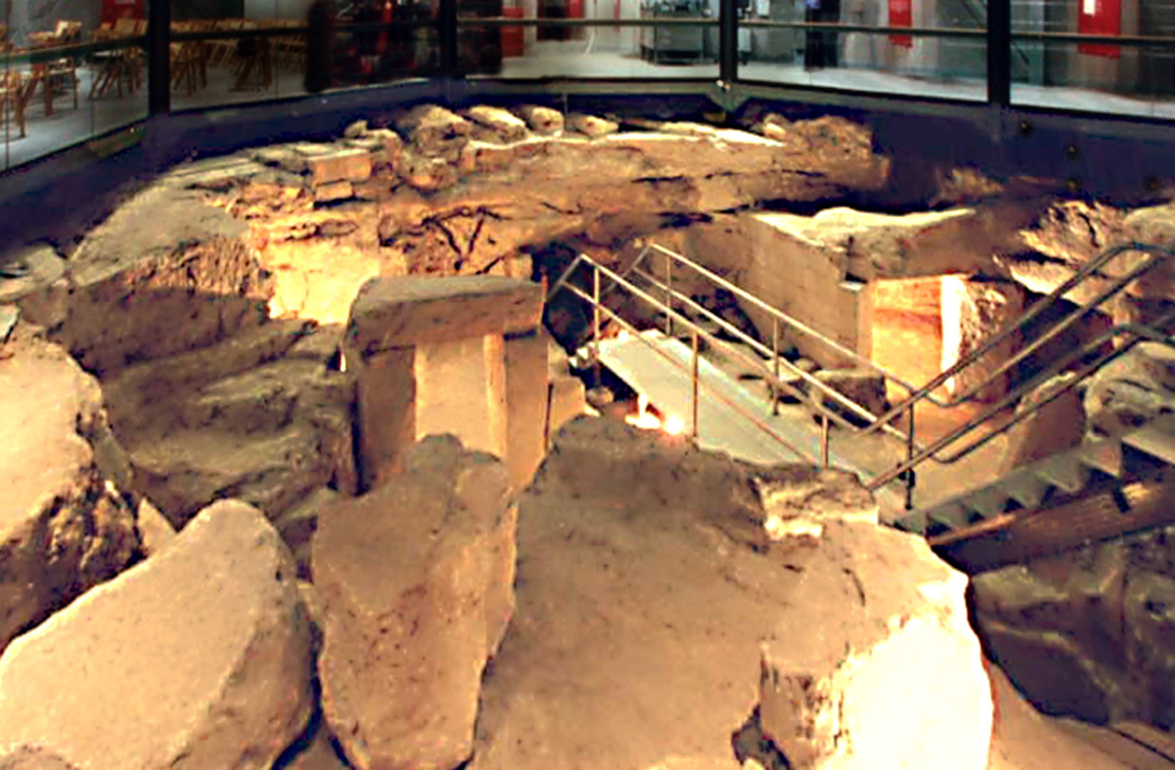 Nouvelle entrée de l'hypogeum de Hal Saflieni